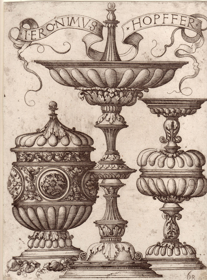 Hopfer, Hieronymus. (um 1500 Augsburg – 1563 Nürnberg). Drei Prunkgefäße. Freie, seitenverkehrte Kopie nach Albrecht Altdorfers 1520-25 entstandenen Kupferstich. Eisenradierung/etching. B. 67. Hollst. 72, II. Vgl. B. 96 (Altdorfer). - Mit dem Namenszug und der Funck-Nummer »68« in der Platte. 28,9 x 21,4 cm. Meist mit winzigem Rändchen. Minimal fleckig sowie mit dünnen Papierstellen in den Ecken.